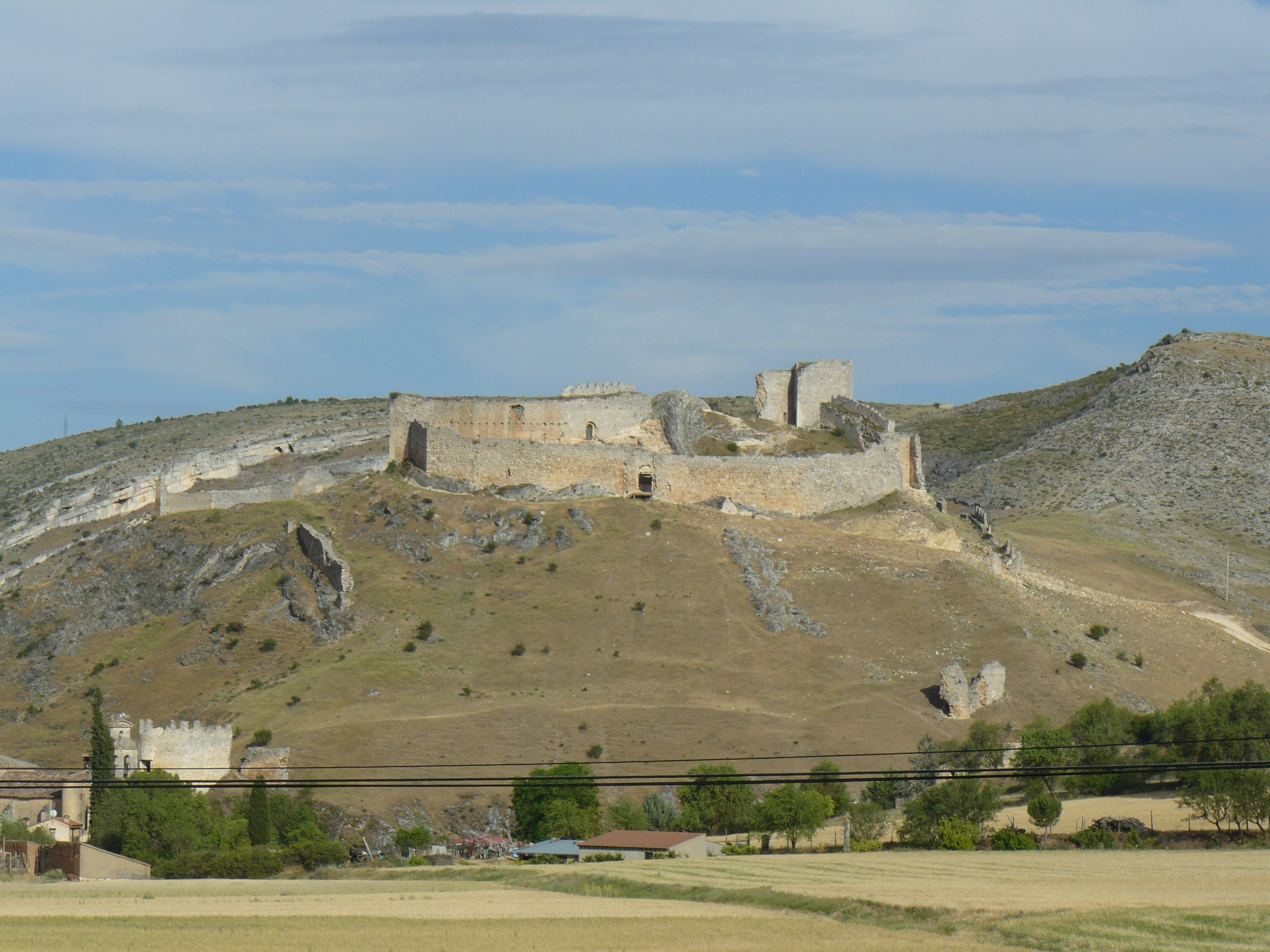 Castillo de Osma, El Burgo de Osma-Ciudad de Osma, Soria.